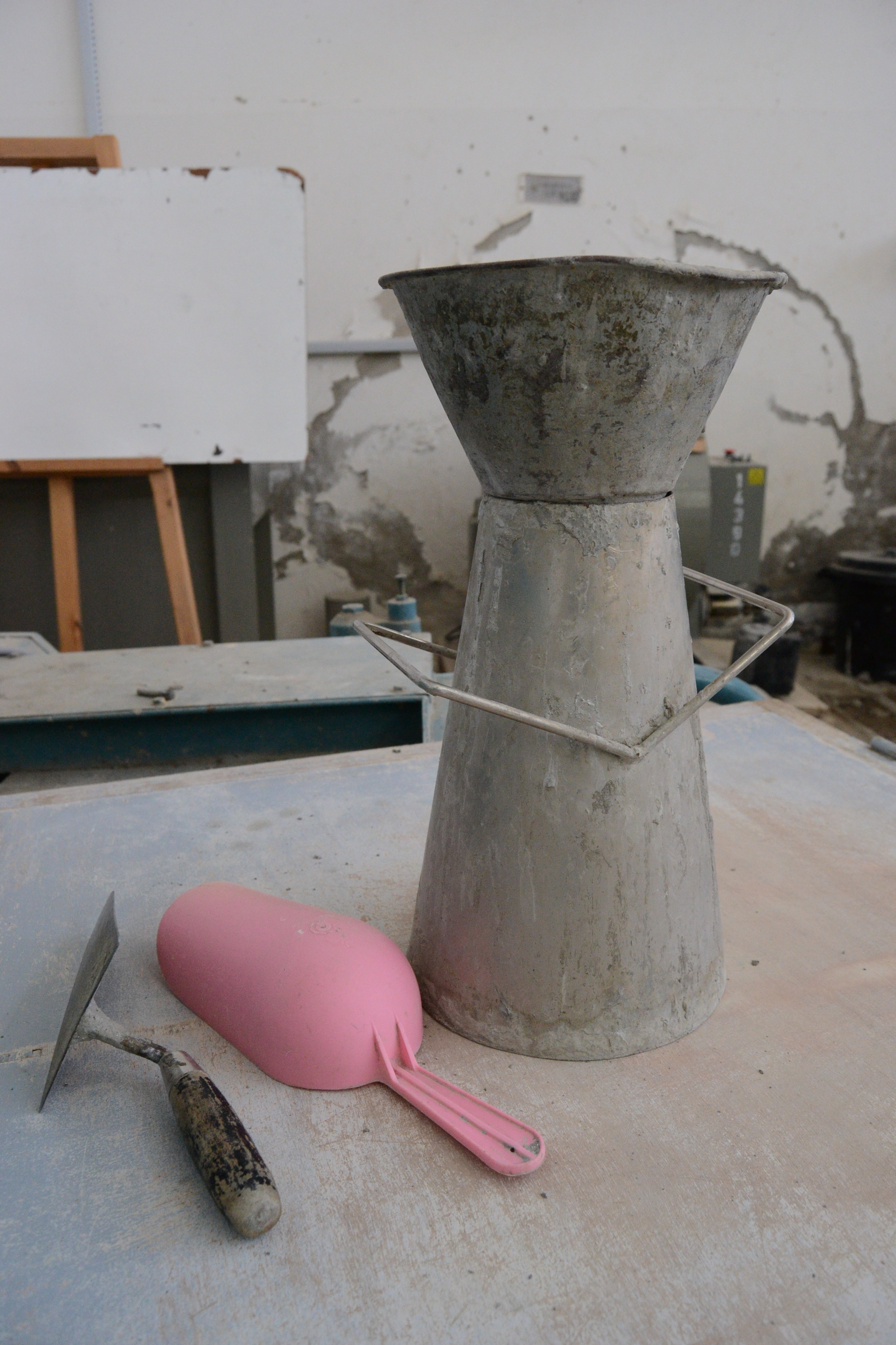 Matériel pour la mesure de l'affaissement du béton frais (Cône d'Abrams)